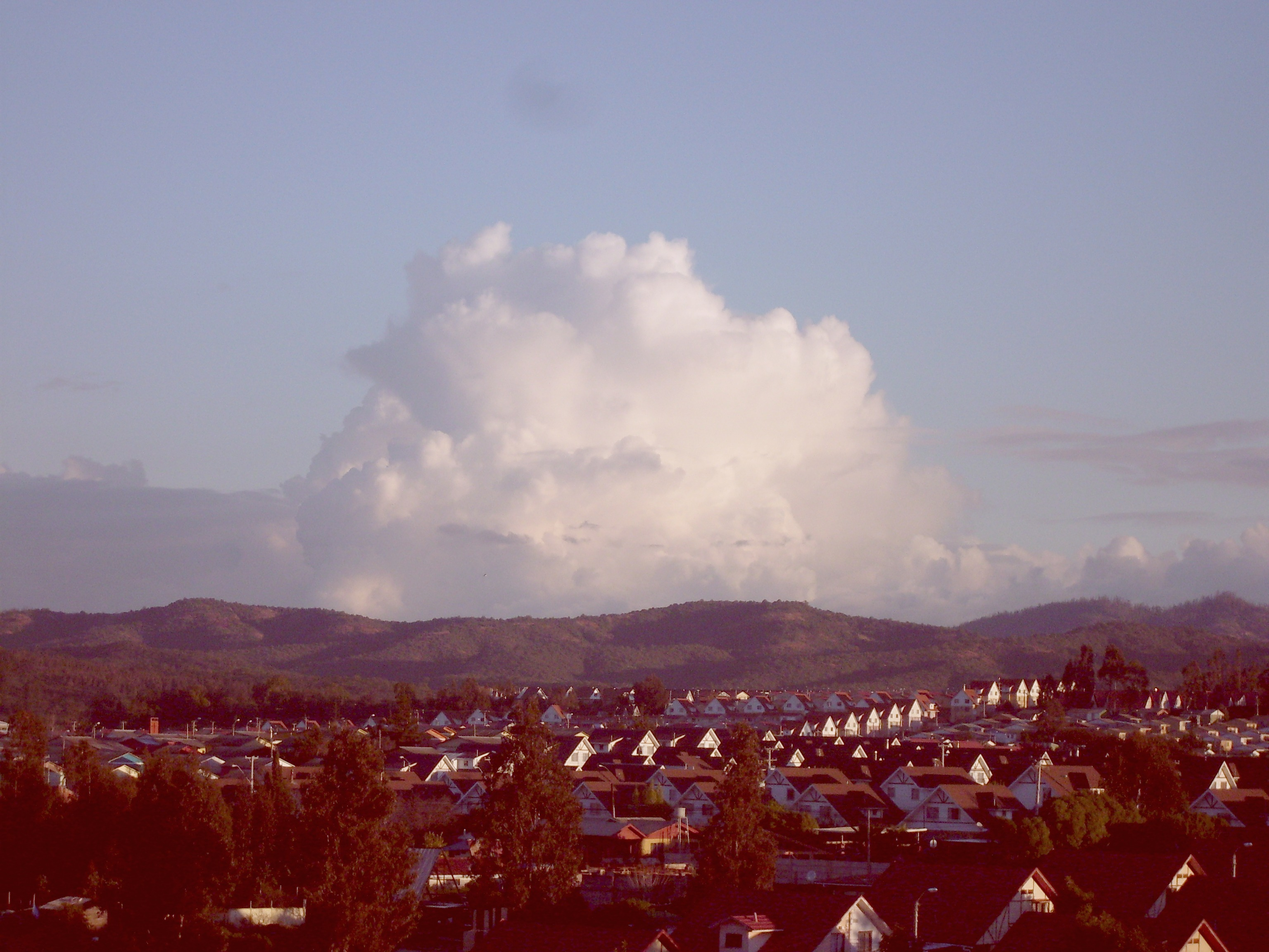 urbanización de la ciudad de Quilpué, Chile.